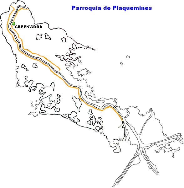 Greenwood, Louisiana